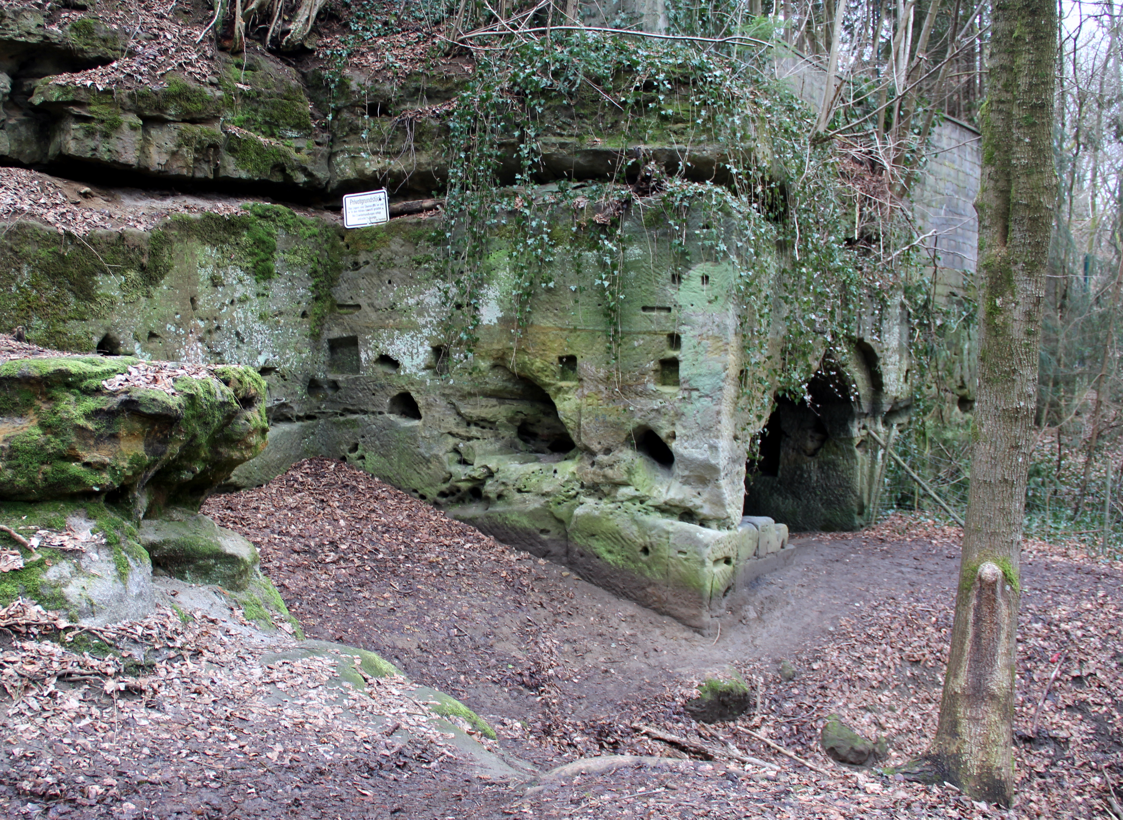 Löwengrube bei Altdorf, Felsenkeller